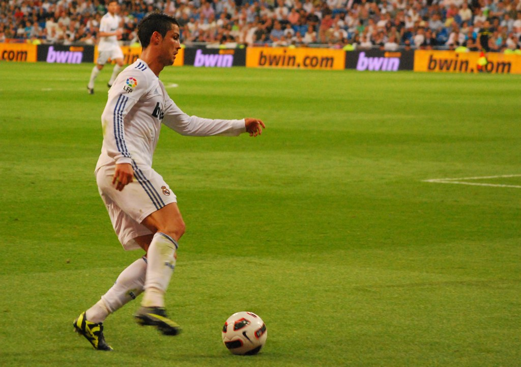 Cristiano Ronaldo lors d'un match entre le Real Madrid et l'UD Almería.